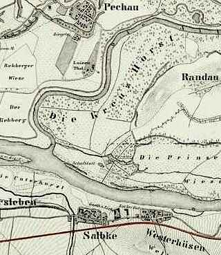 Ausschnitt aus der Karte von Albrecht Platt, Gebiet der Kreuzhorst, Karte nicht eingenordet, unten (westen) Salbke und Westerhüsen, oben (osten) Pechau, links (norden) Rehberg, Innerhalb der Kreuzhorst sind Forsthaus und Schafstall eingezeichnet